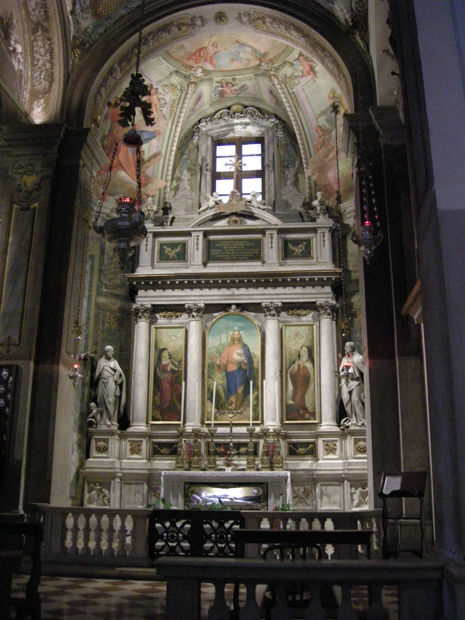 Duomo di udine, altare con sacro cuore di gesù